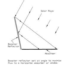 Apsorpcija Sunčevih zraka